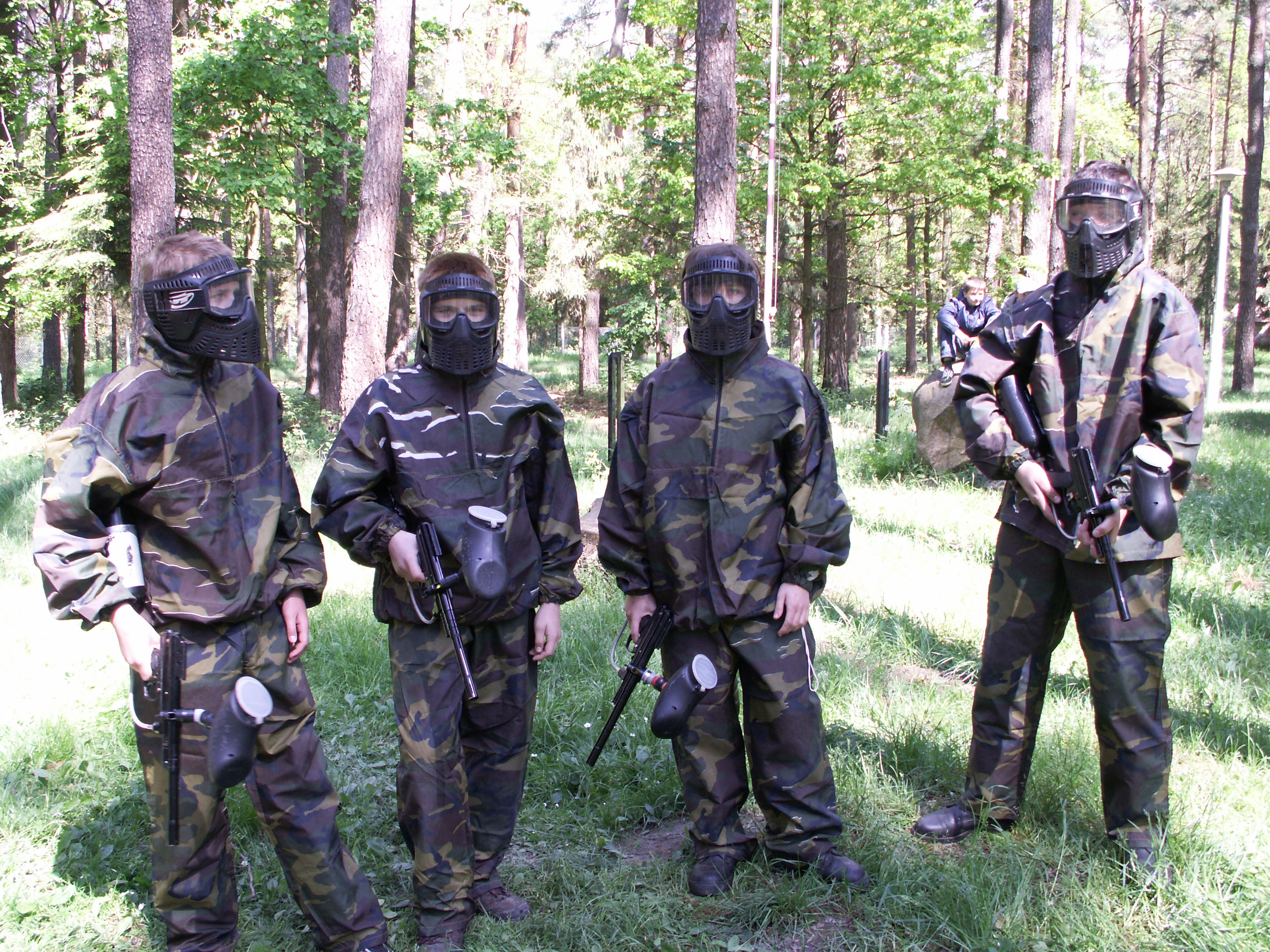 Stanica Harcesrka